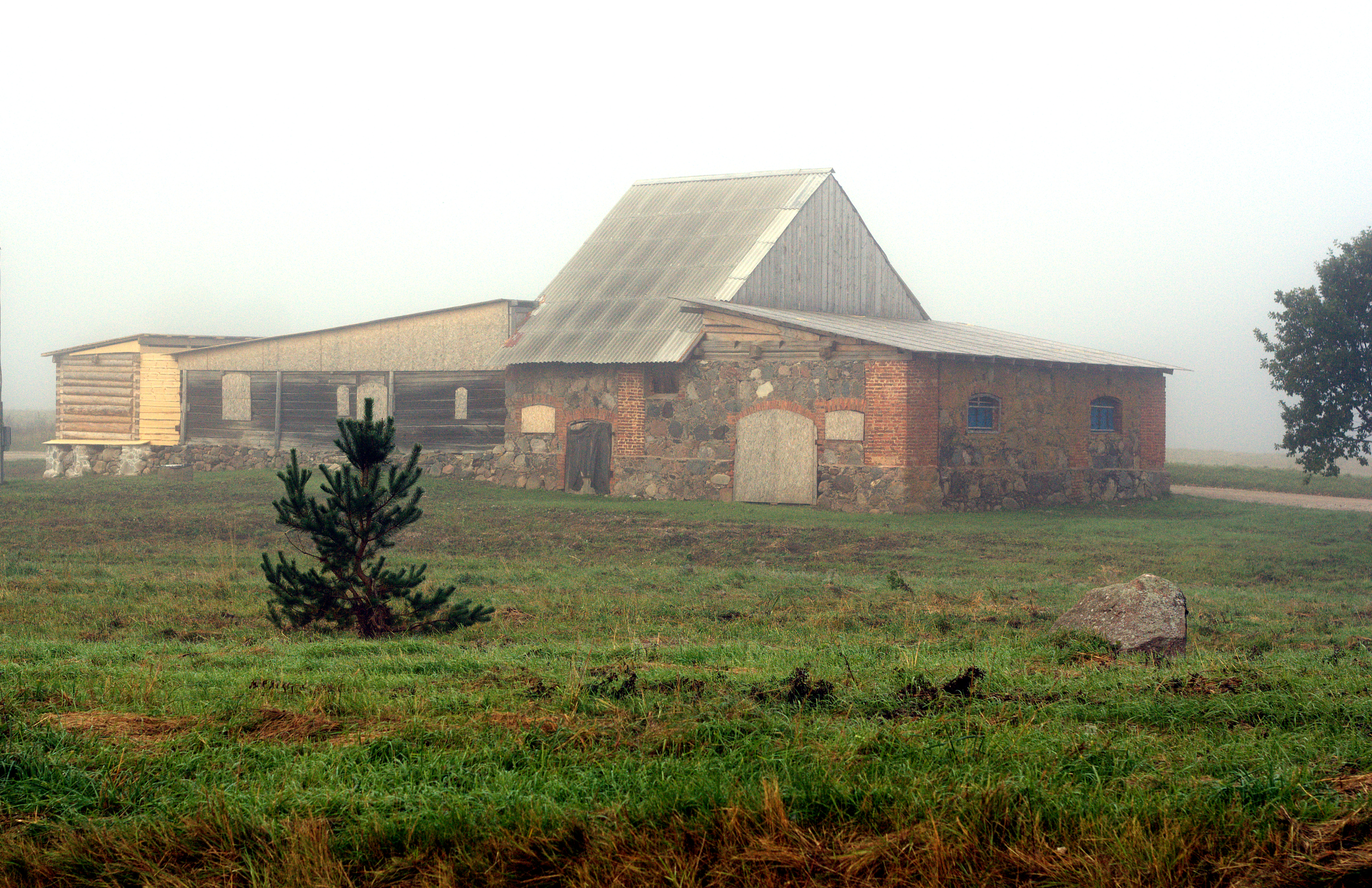 Joosu kõrts Põlva-Võru maanteelt vaadates